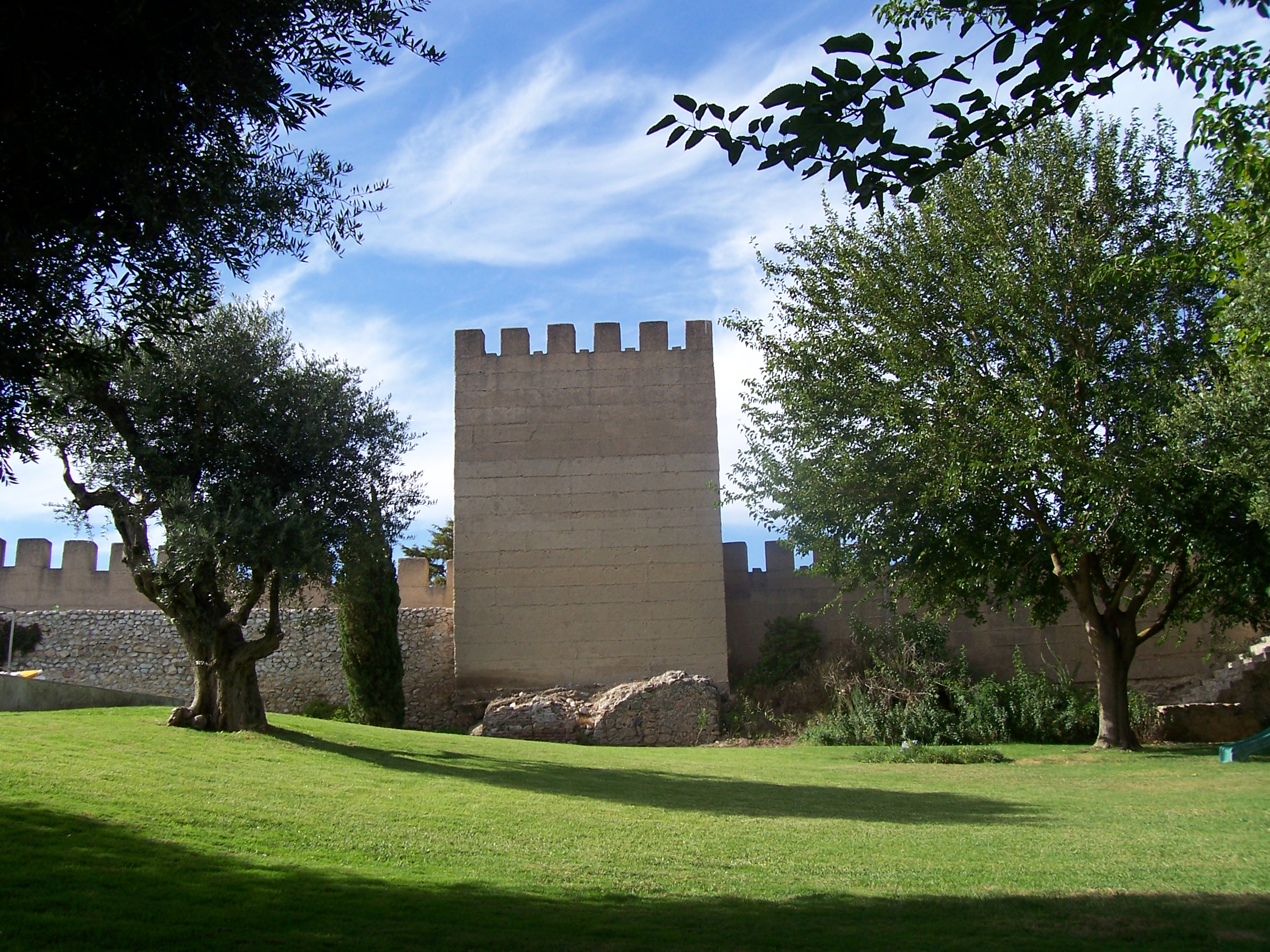 jardins This file was uploaded for Wiki Loves Monuments in Portugal with the unique identifier 70159.